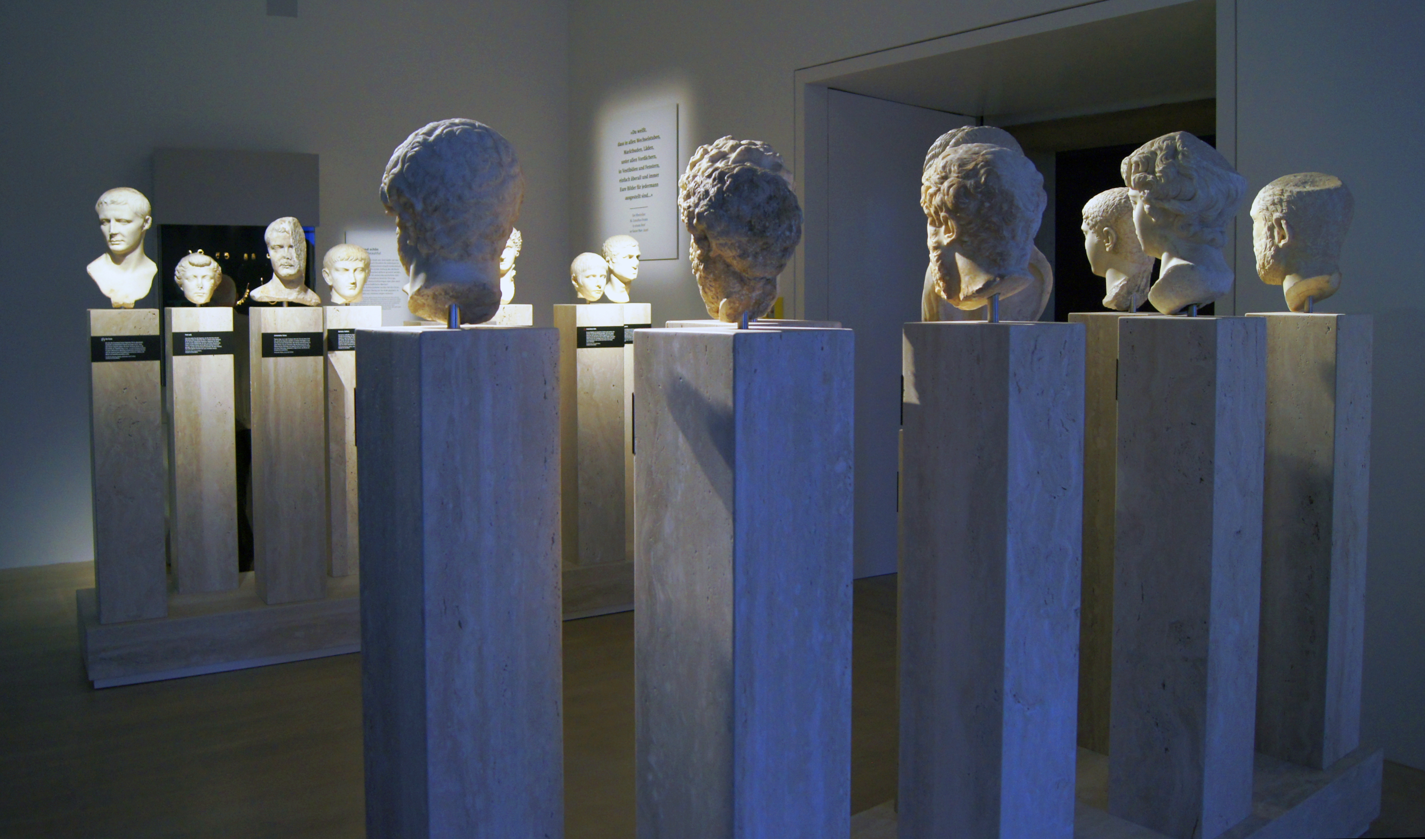 Römische Kaiserportraits in der Antiken-Sammlung des Landesmuseums Württemberg, Stuttgart